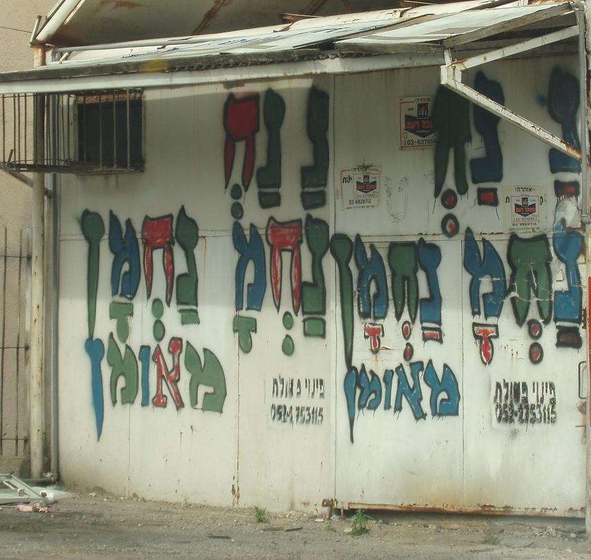 נחמן מאומן. צולם בדרום תל אביב. צילם דוד שי